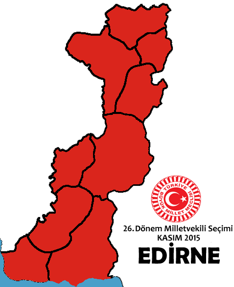 Kasım 2015 seçimleri